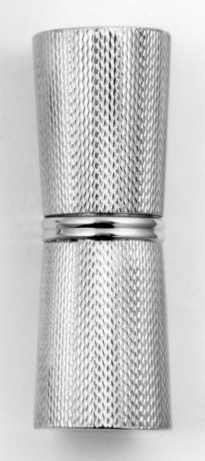 Portarossetto in oro inciso con la tecnica guillocher o ghiglioscé, prodotto del distretto orafo di Valenza, ITALIA